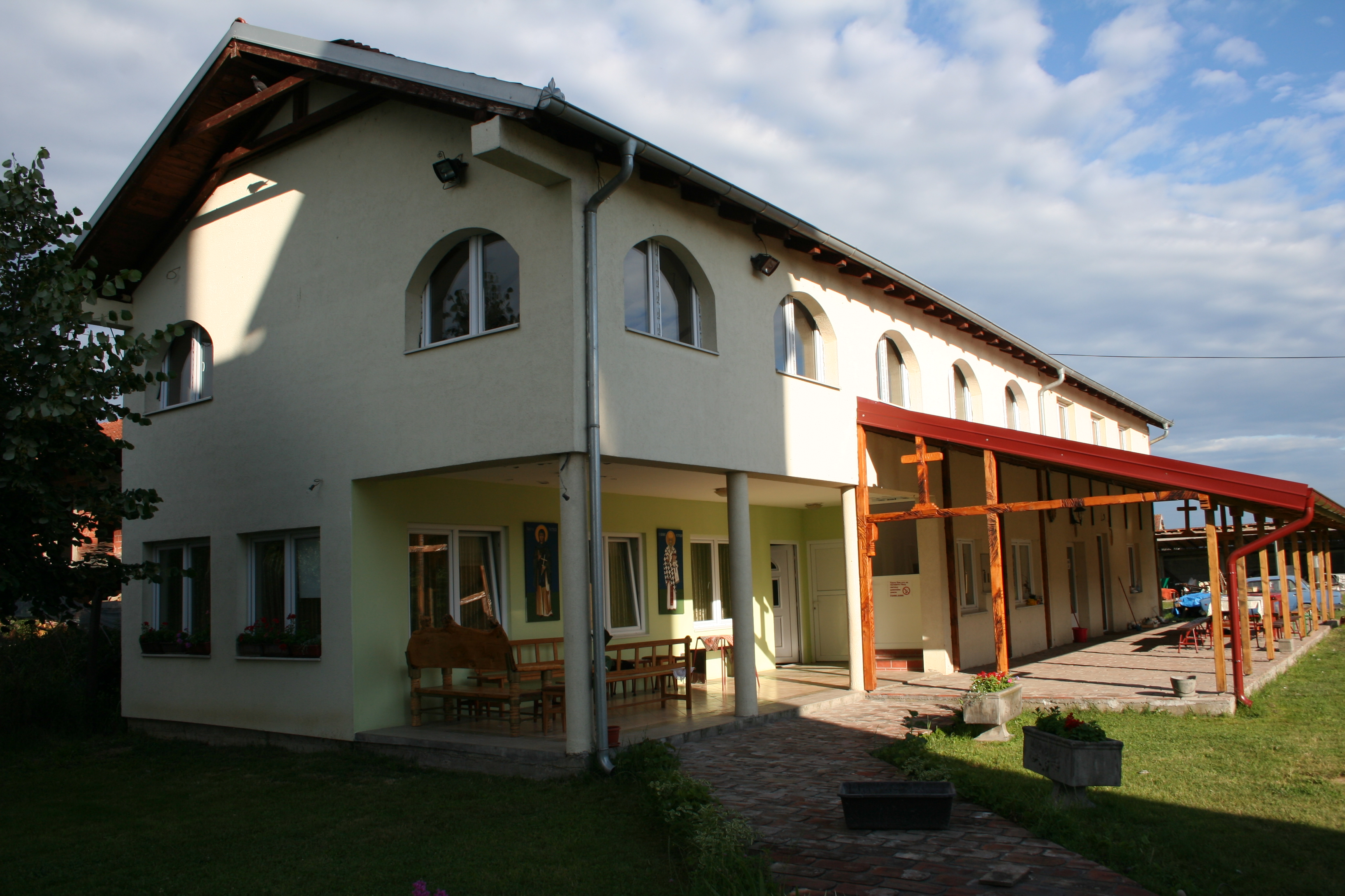 Crkva Svetog Vasilija Ostroškog u Kasarskim livadama